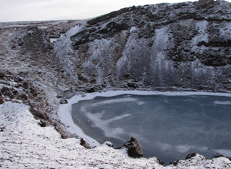 Kerið volcanic crater, Iceland